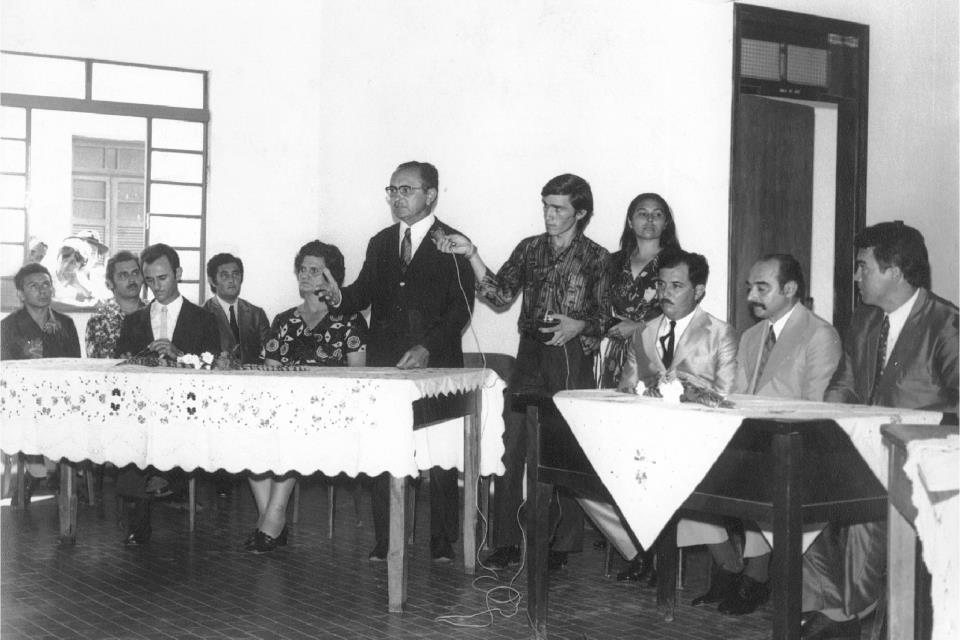 Primeira Legislatura da Câmara Municipal de Rio Verde de Mato Grosso